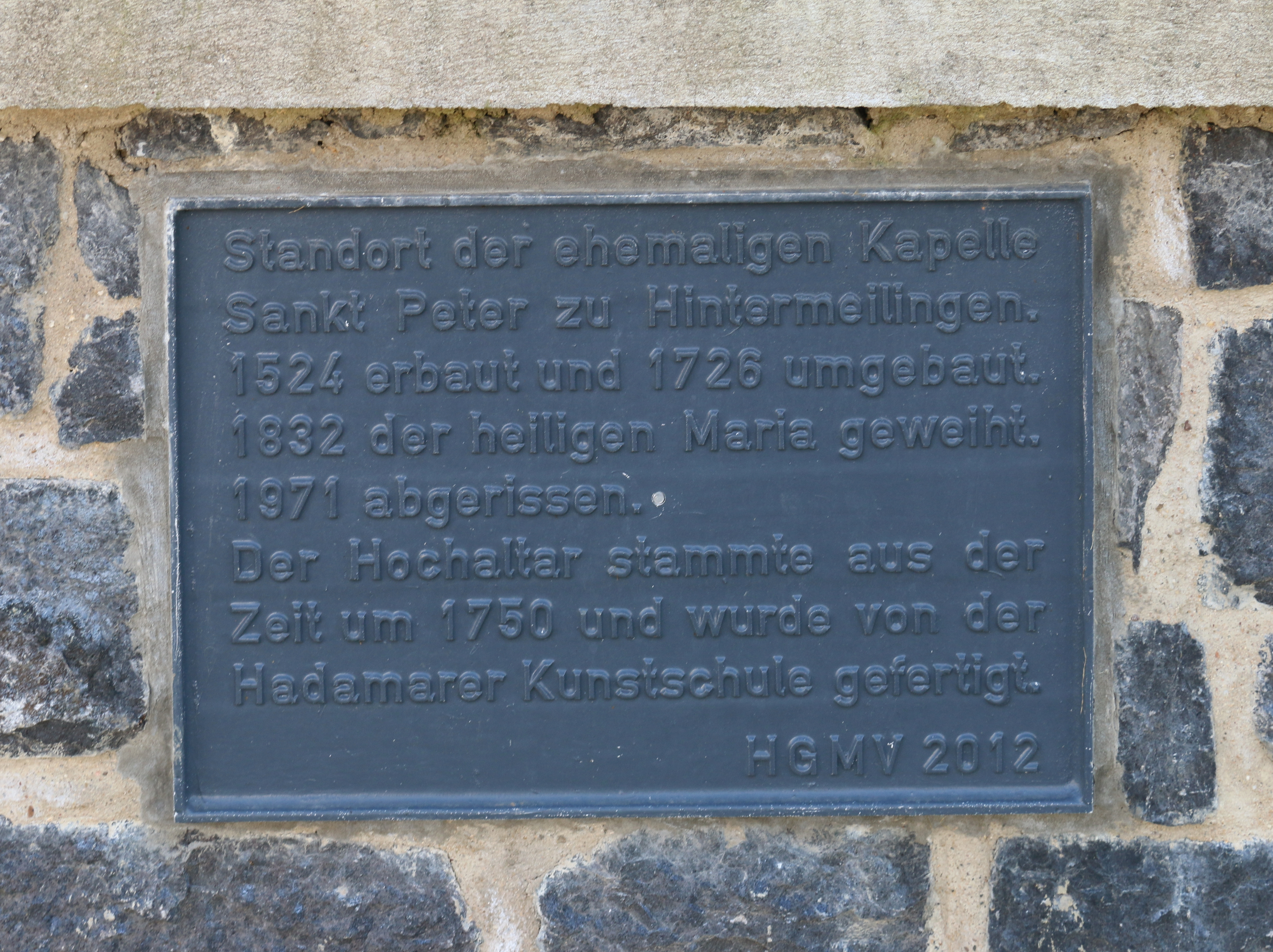 Hintermeilingen: Hinweistafel auf die ehemalige Kapelle